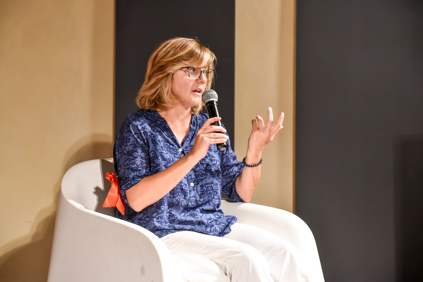 Monia Andreani durante un suo intervento pubblico